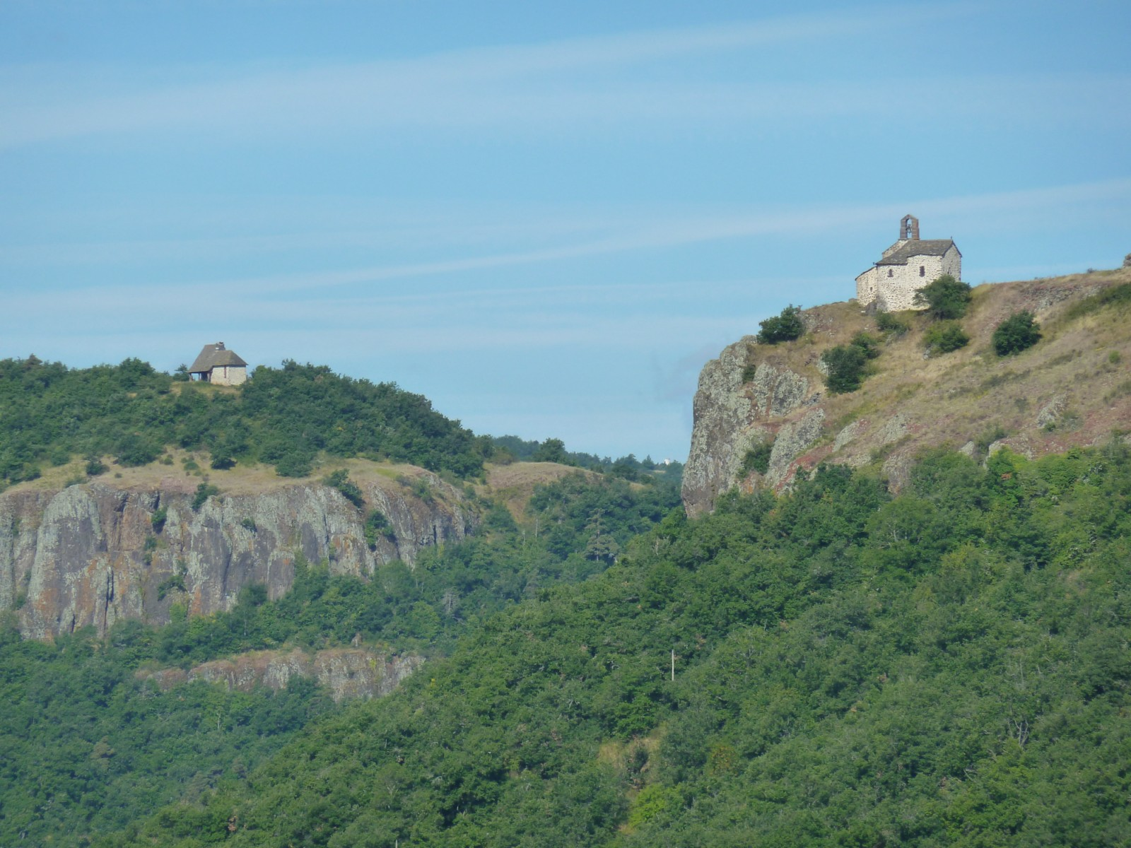 La chapelle Sainte-Madeleine et le refuge Saint Victor - Massiac- Cantal - France